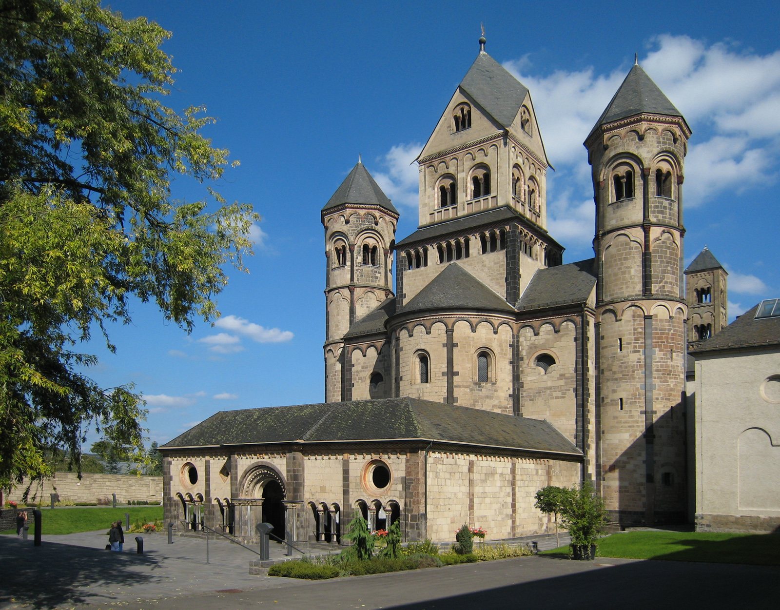 Maria Laach Kameraposition 50° 24′ 7,56″ N, 7° 15′ 5,40″ O Dieses und weitere Bilder auf Google Maps - Google Earth - OpenStreetMap(Information)